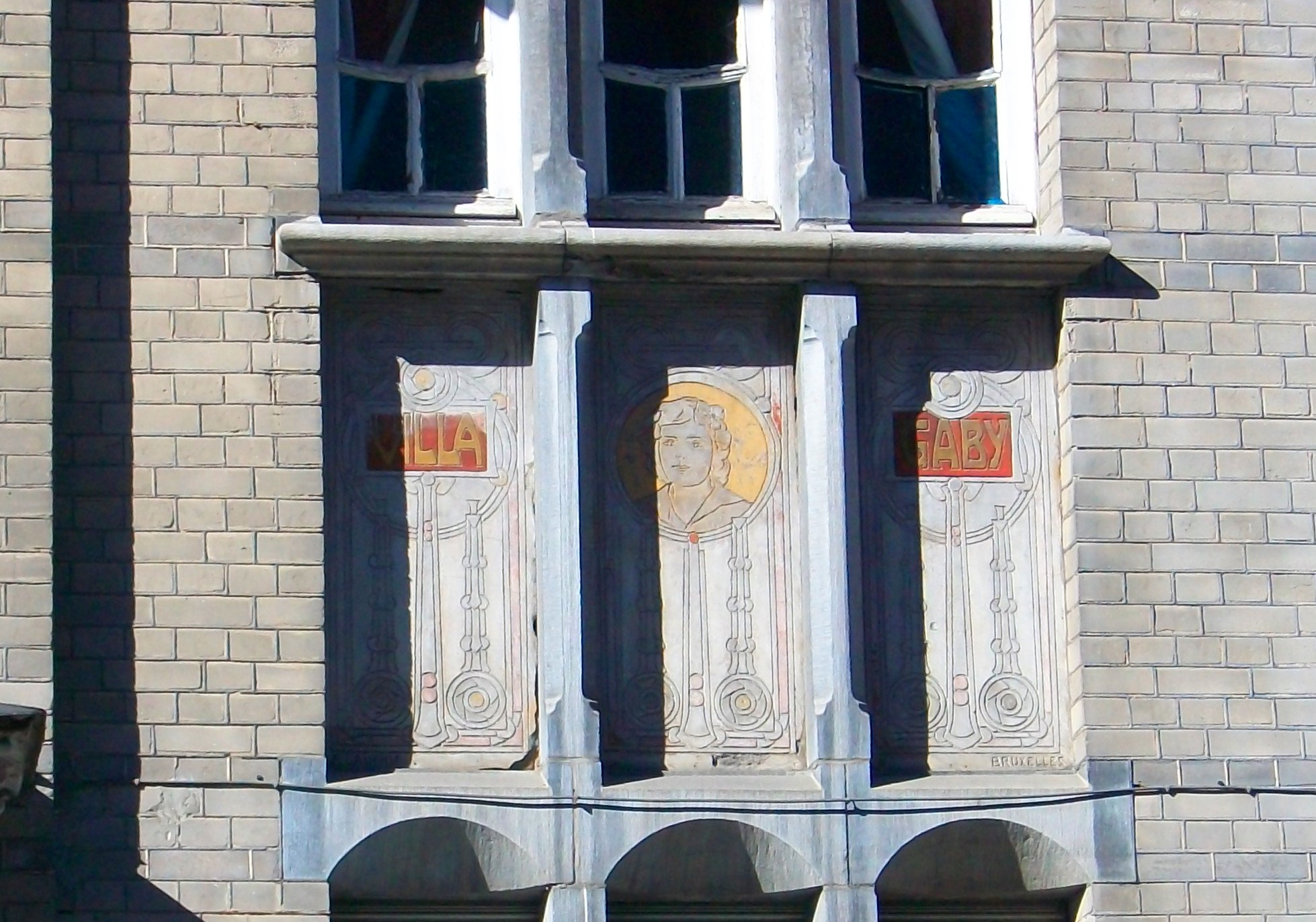 Villa Gaby Jambes (Namur) sgraffite de Paul Cauchie 1908